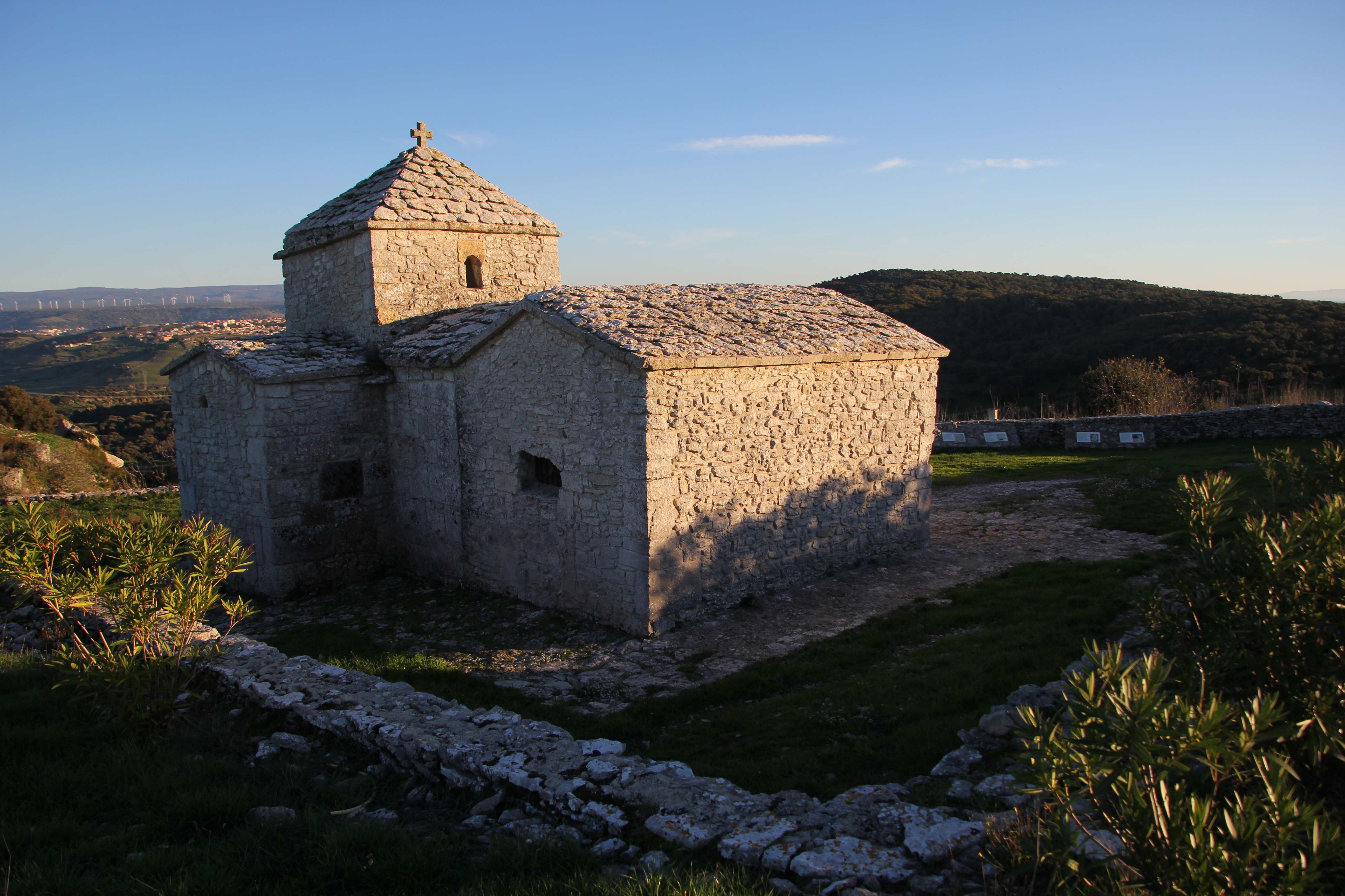 Cossoine - Chiesa di Santa Maria Iscalas